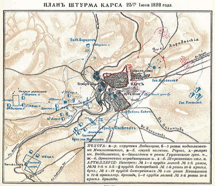 ПЛАН ШТУРМА КАРСА. 23-го июня 1828 года. ПЕХОТА: а — р. поручика Лабинцева, б — 3 роты подполковника Миклашевского, в — б. егерей полковника Реута, д — резерв князя Вадобольского, е — батальоны и роты Грузинского гренадерского полка, ж — б. Эриванского карабинерного полка, з — б. Ширванского пехотного полка. АРТИЛЛЕРИЯ: Батареи: № 1—4 орудия легкой № 2-ой роты, №№ 2-й и 3-й — 8 орудий батарейной № 1-й роты 20-й артиллерийской бригады, № 4—12 орудий батарейных № 1-х рот Кавказкой и 21-й артиллер. бригад, I — 2 орудия легкой № 2-й роты 20-й артил. бригады.